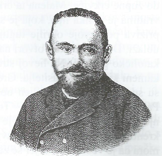 Srpskohrvatski / српскохрватски: Đuro Kuten, hrvatski pedagog